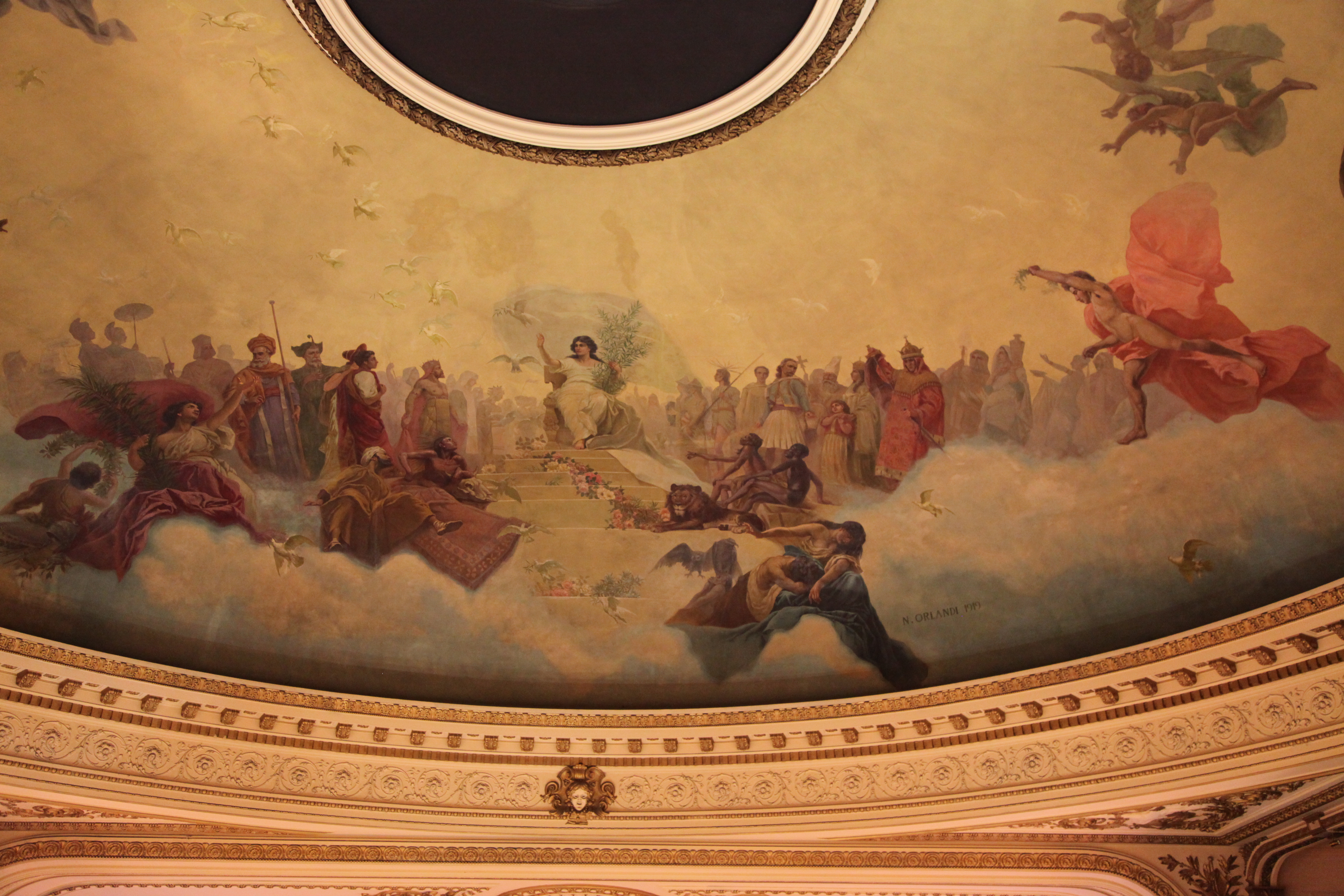 El Ateneo bookstore